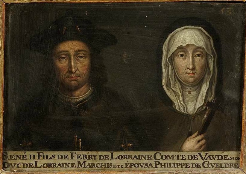 Portrait de René II, duc de Lorraine de 1473 à 1508, et de son épouse Philippe de Gueldre. Ce tableau fait partie d'une suite d'une soixantaine de double-portraits représentant les ducs et duchesses de Lorraine ainsi que leurs ancêtres supposés. Musée des Offices, Florence (Inv. 1890, 631)